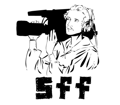 Oficjalne logo Słowacki Film Fest.